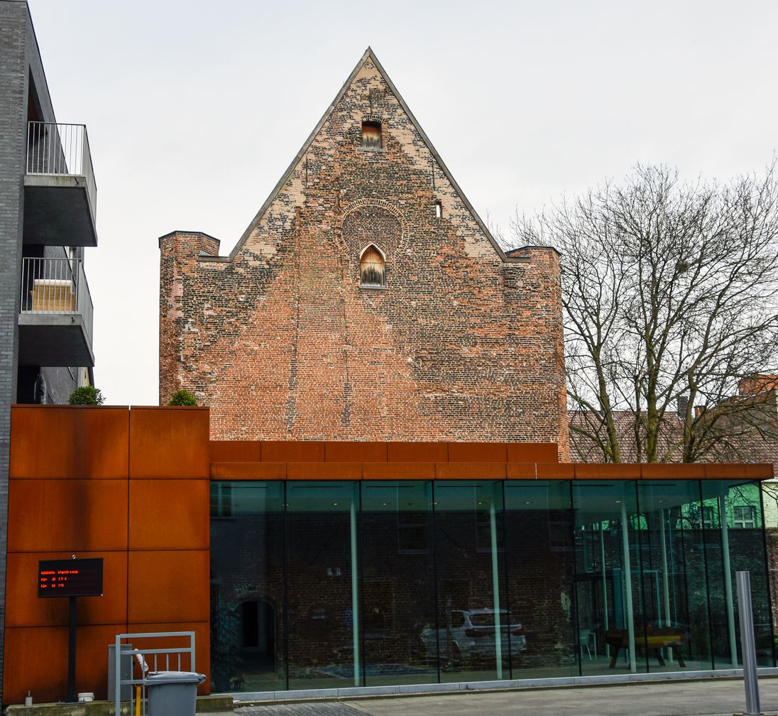 Wolweverskapel